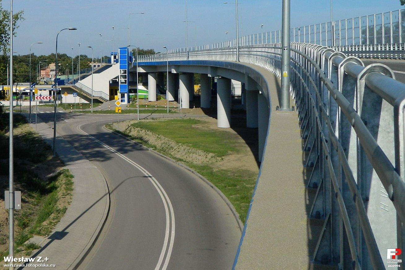 Wiadukt na Klasyków